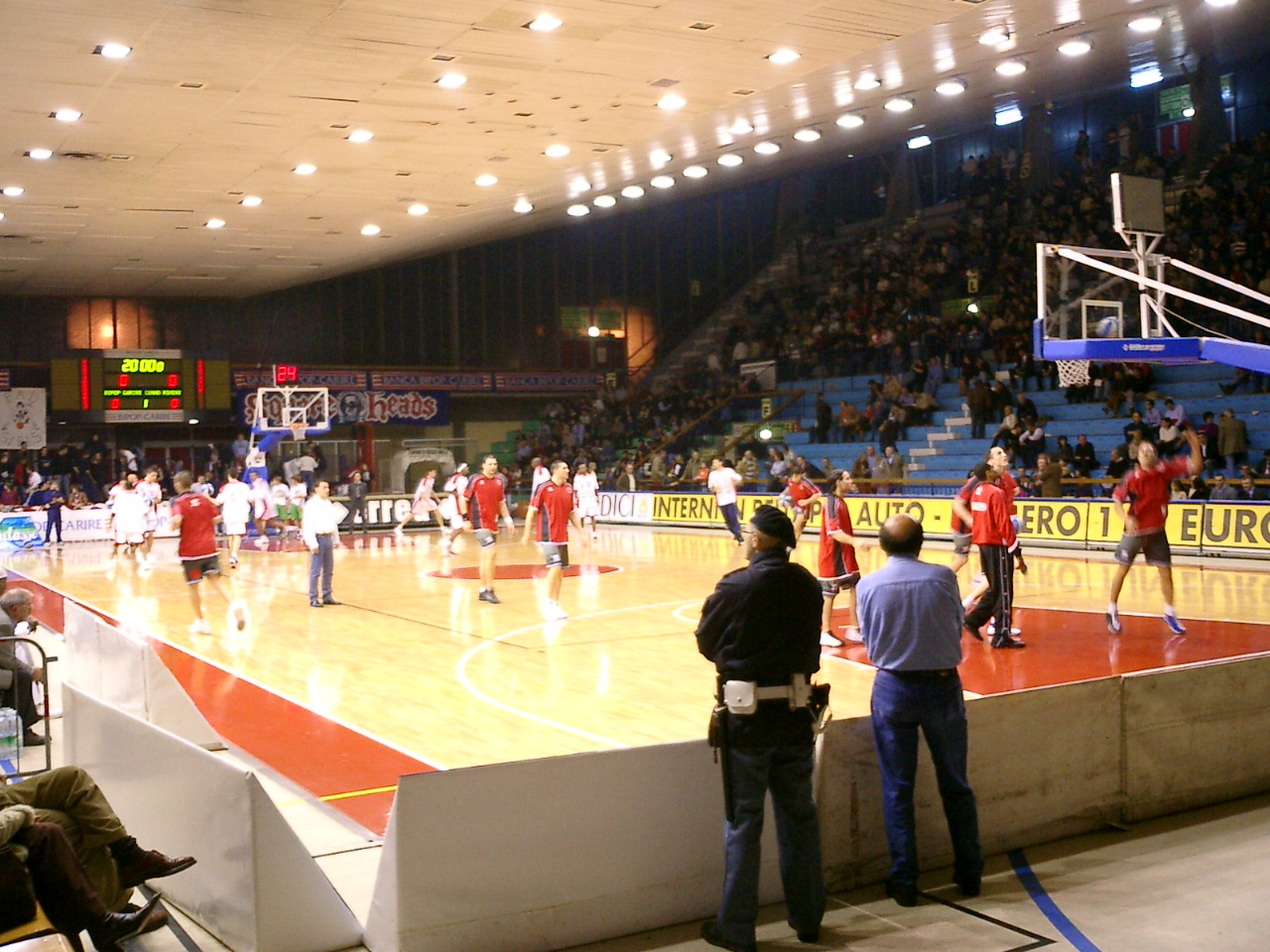 Il Palasport Bigi di Reggio Emilia nell'ottobre 2003.